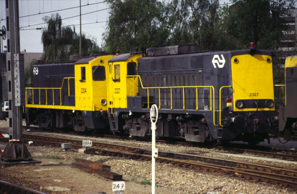 Op 16 april 1991 stonden deze twee DE-locs in rust, de 2327 en de 2204 te Rotterdam CS, op kopspoor 18.